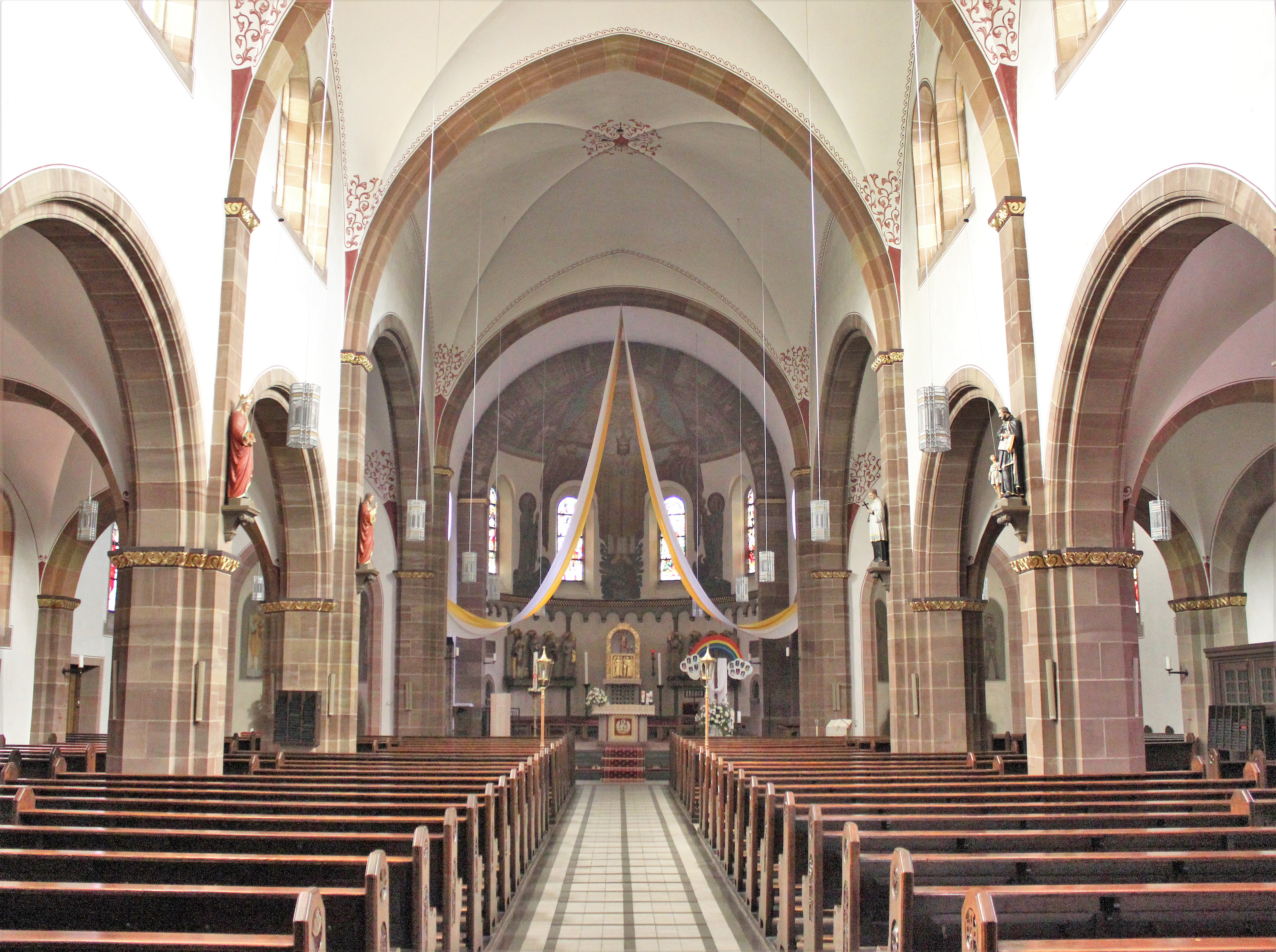 Blick ins Innere der katholischen Pfarrkirche St. Josef in Fischbach-Camphausen, Gemeinde Quierschied, Regionalverband Saarbrücken, Saarland